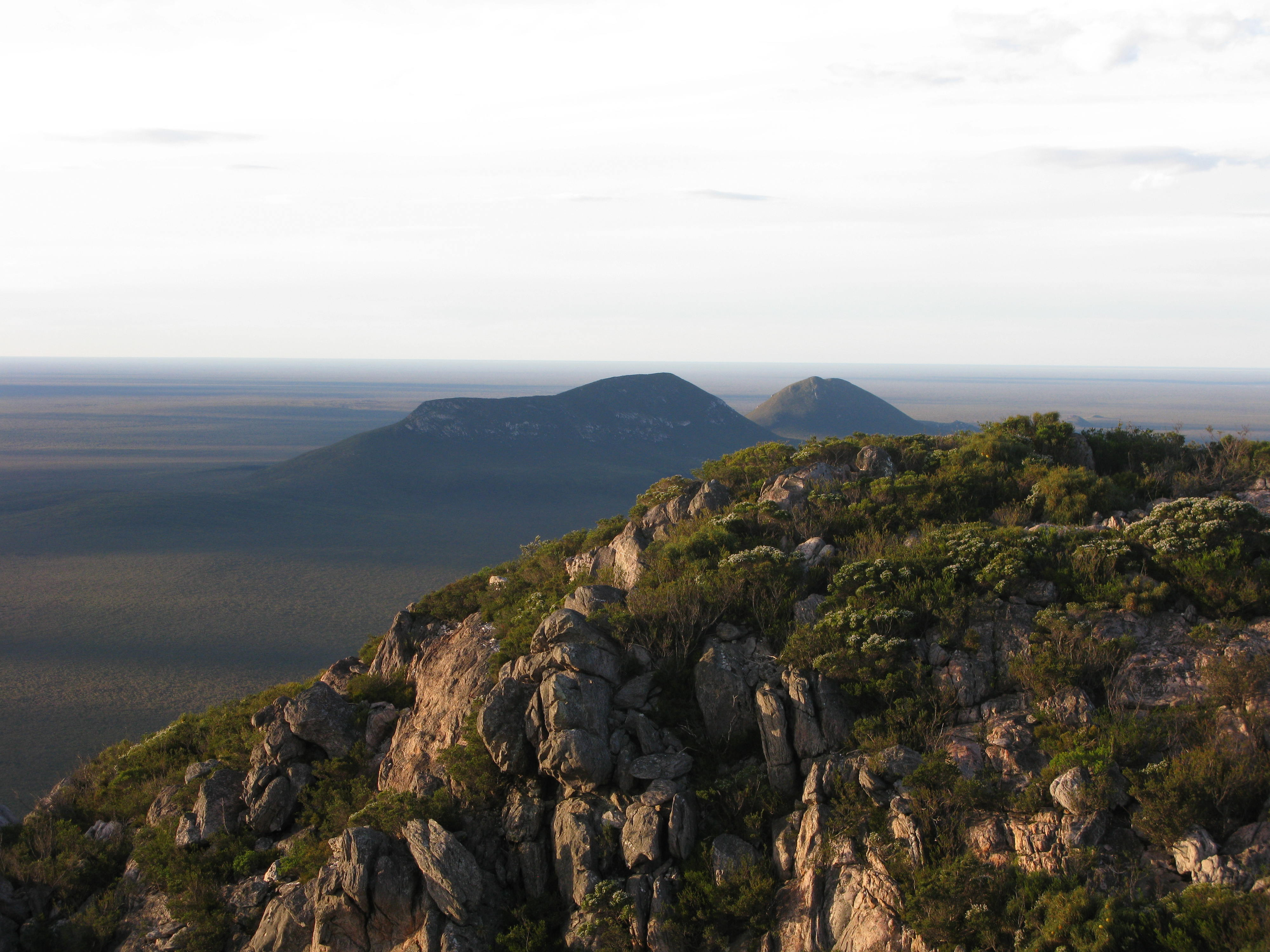 Lo massís quarsitic de Russell ambé maquis sur rocas siliciosas au mitan de la plana arenosa dau parque nationau de Cap Escàs fòrça plantat de mallee.